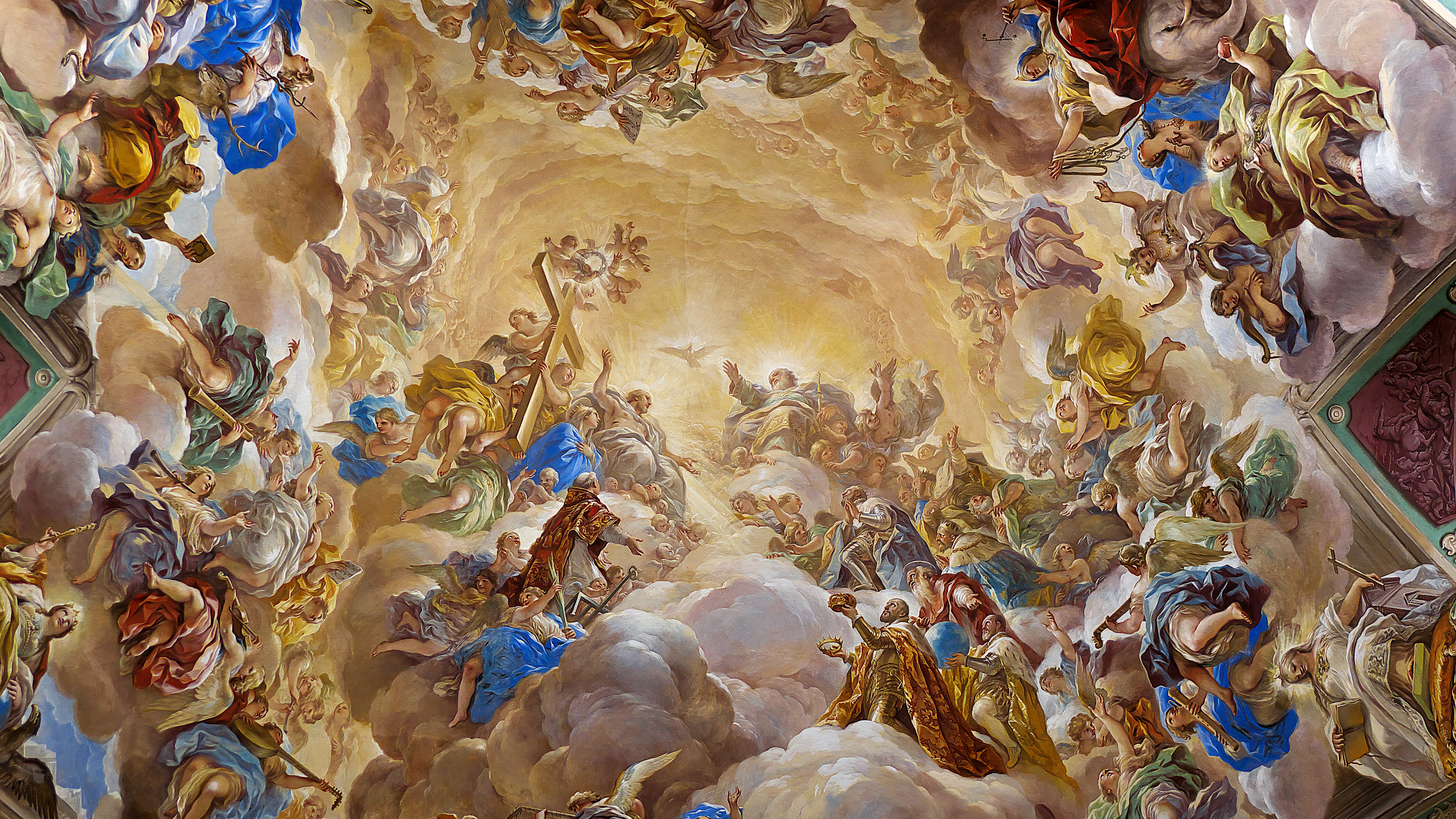 Carlos II de España y el prior fray Alonso de Talavera quedaron sorprendidos por el dominio de la pintura al fresco de Lucas Jordán (1692-1693)